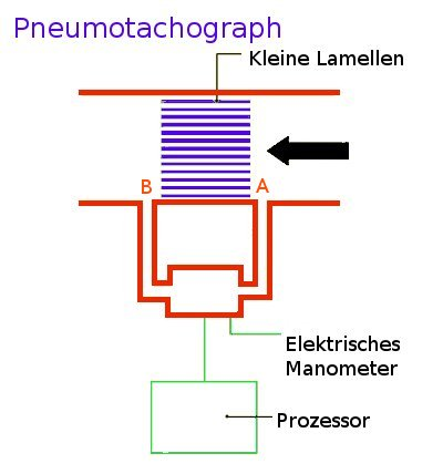 Schematische Darstellung der Funktion eines Pneumotachographen